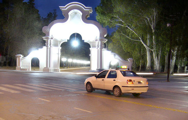 Parque de Mayo, Bahía Blanca, Buenos Aires Province, Argentina